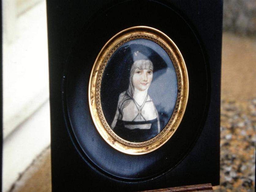 Único retrato original que se conserva de Adela